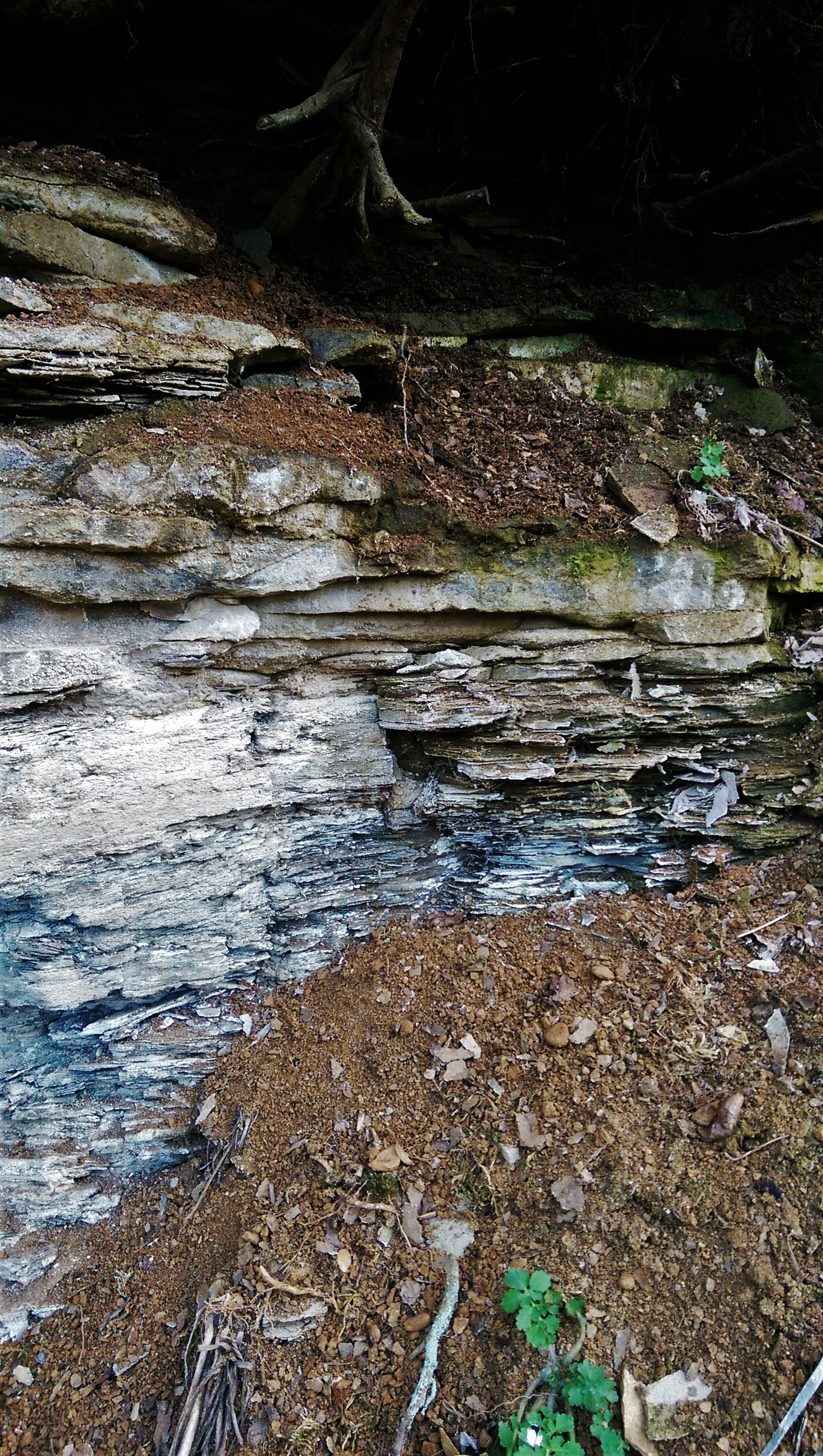 Aufschluss des Possidonienschiefers bei Hetzles